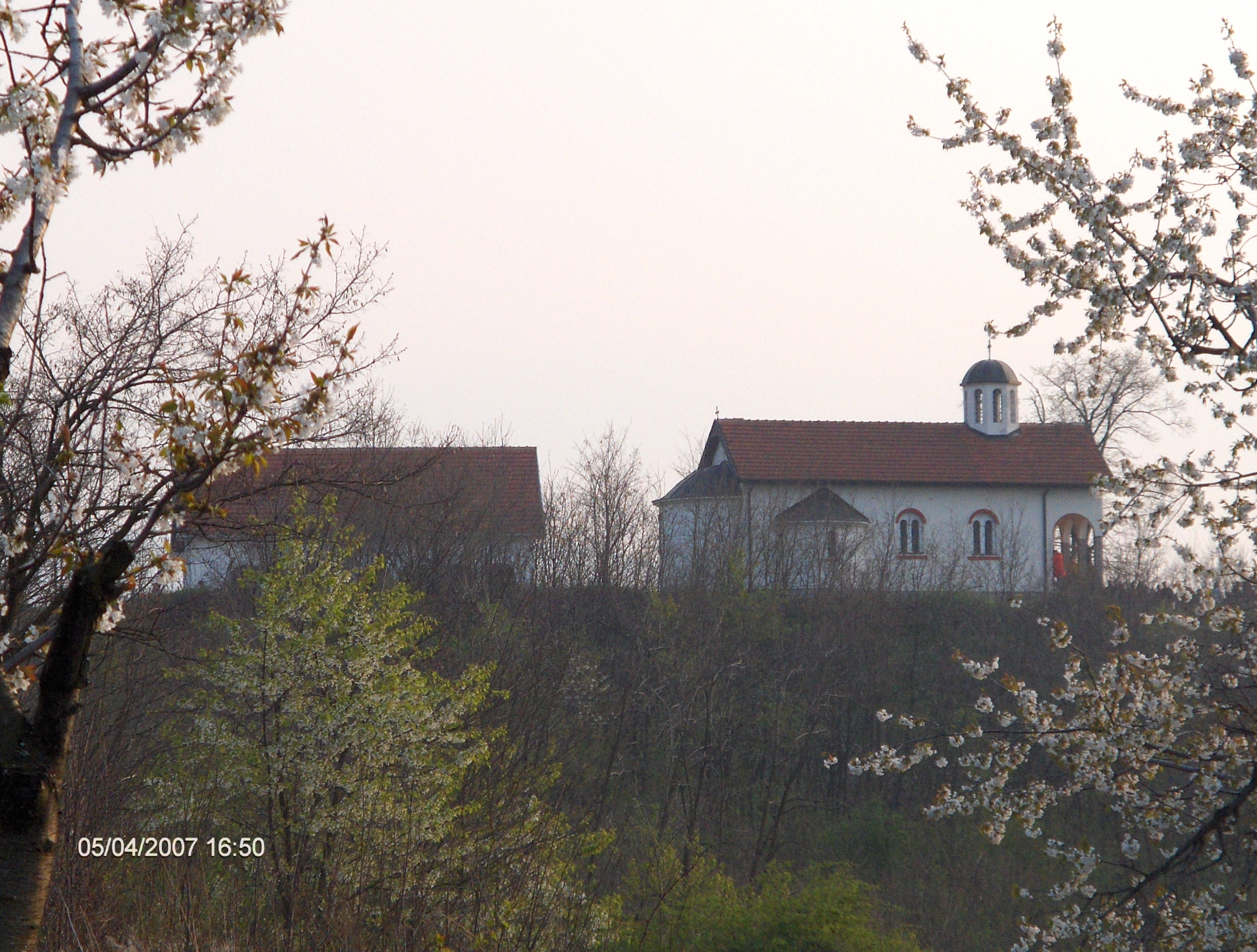 црква Св.Тројица - Велика Грабовница (Лесковац), аутор Дејан Илић Маткин